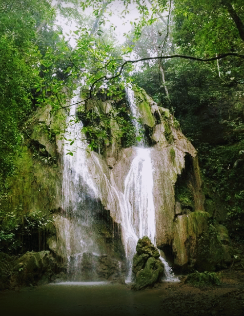 Parque ecológico y turístico en la ribera el Tzitzún, San Fernando, Chiapas